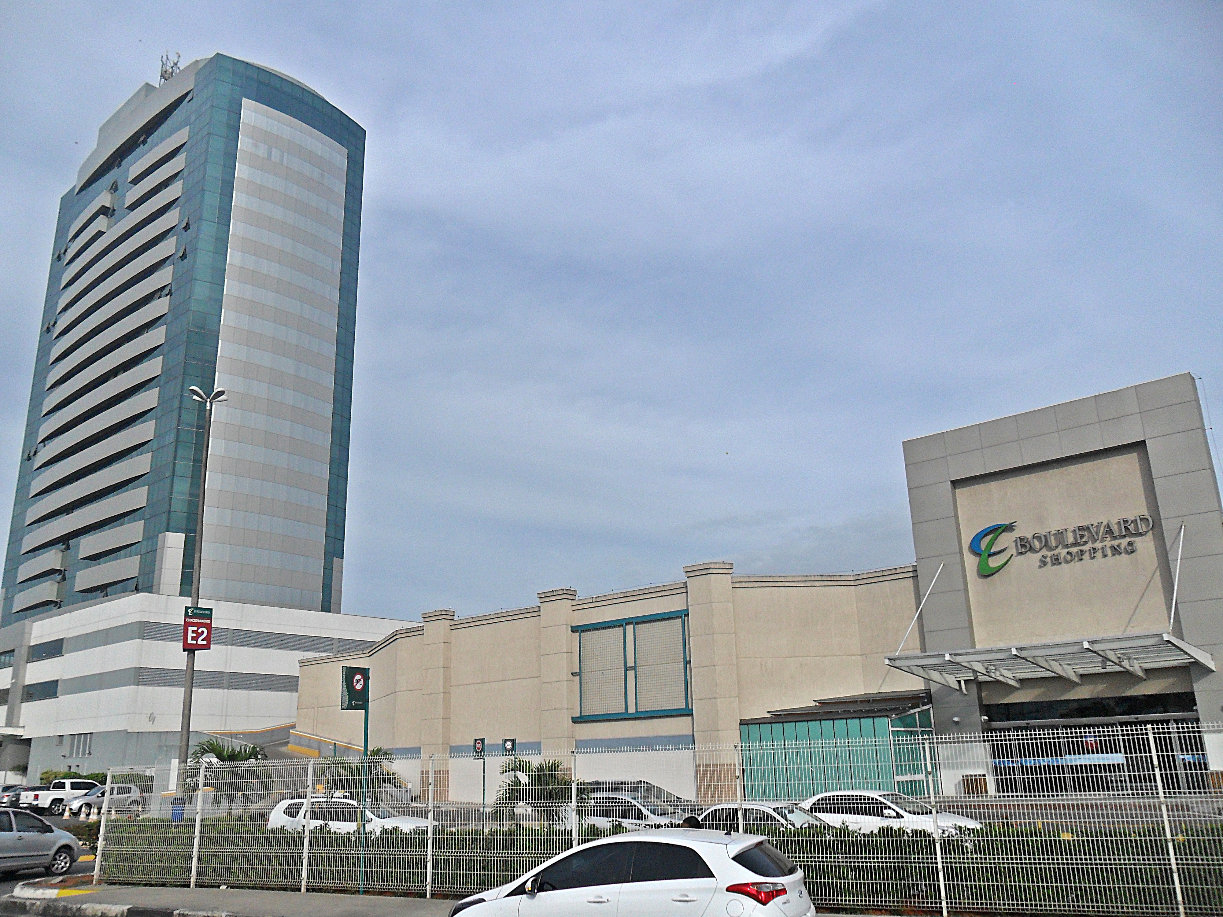 Português do Brasil: Shopping Feira